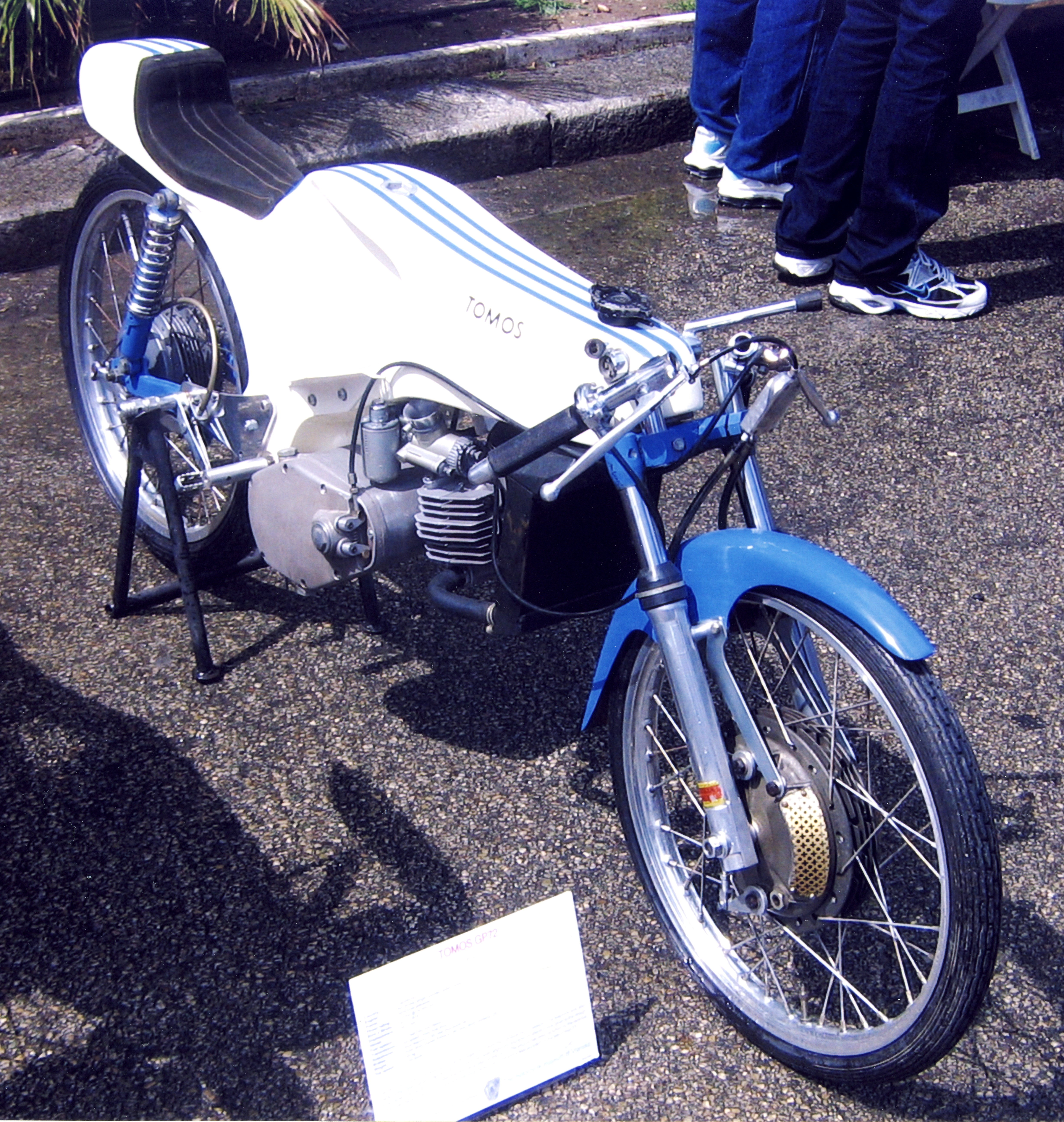 Una Tomos D6 del 1972 durante il Pasolini Day del 2007